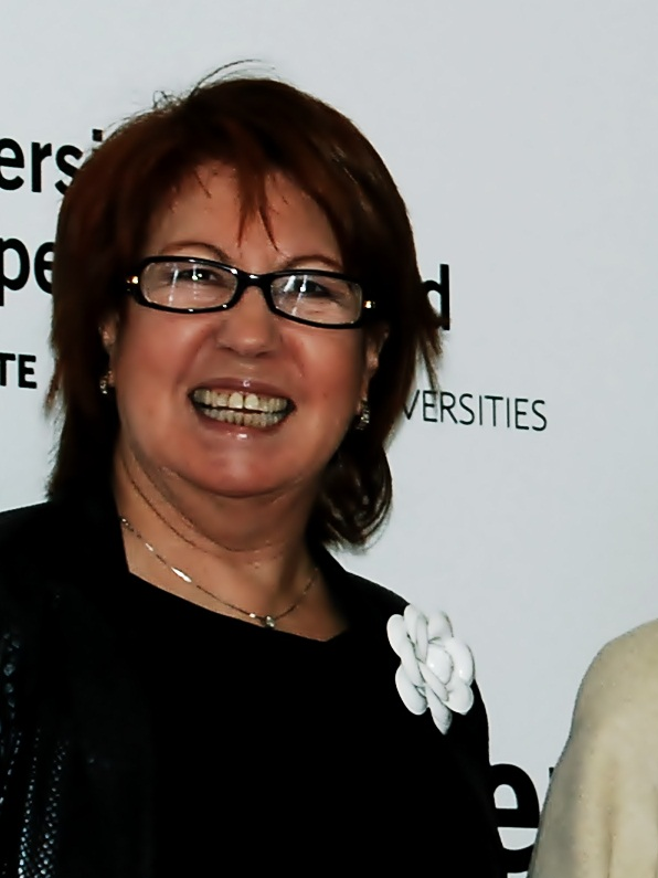 La periodista Rosa Villacastín junto con la actriz Lina Morgan.